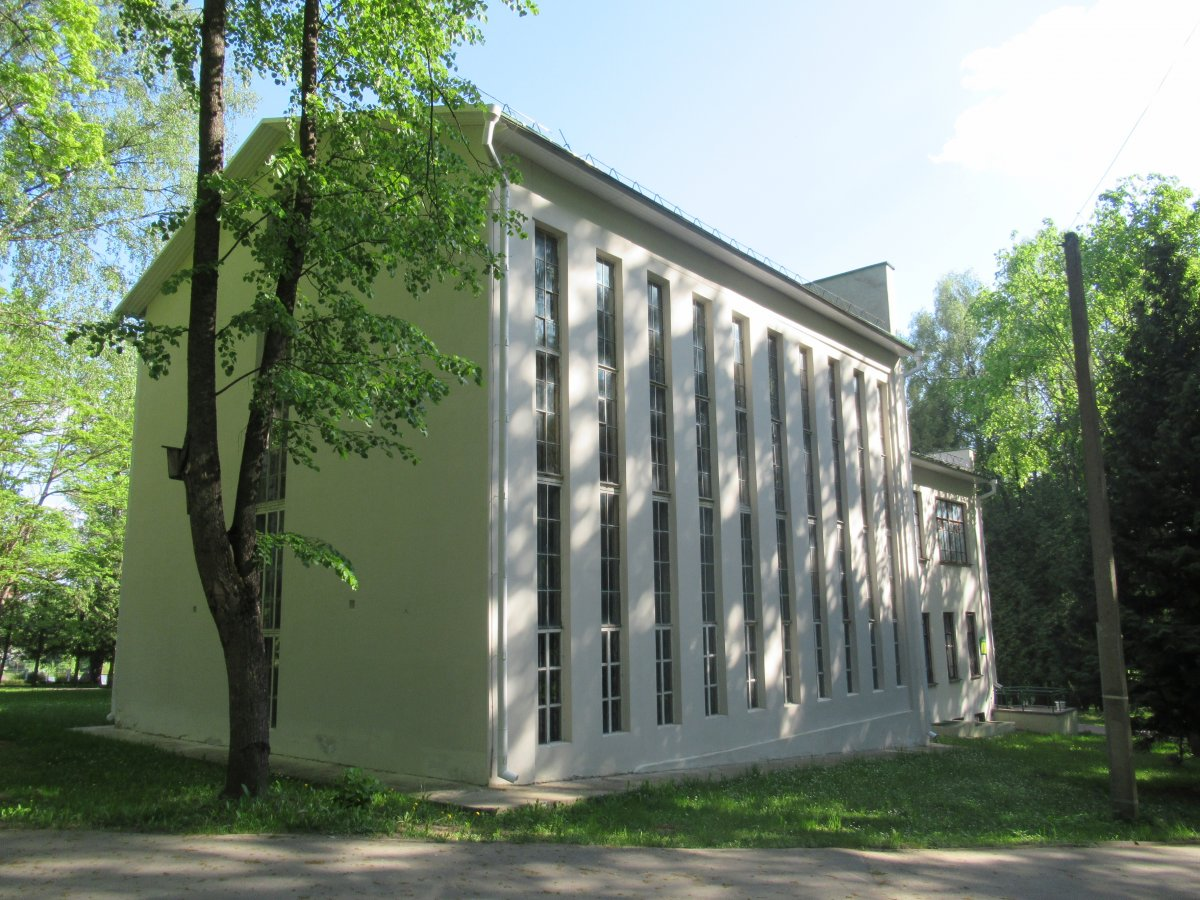 Горкі. Краявіды